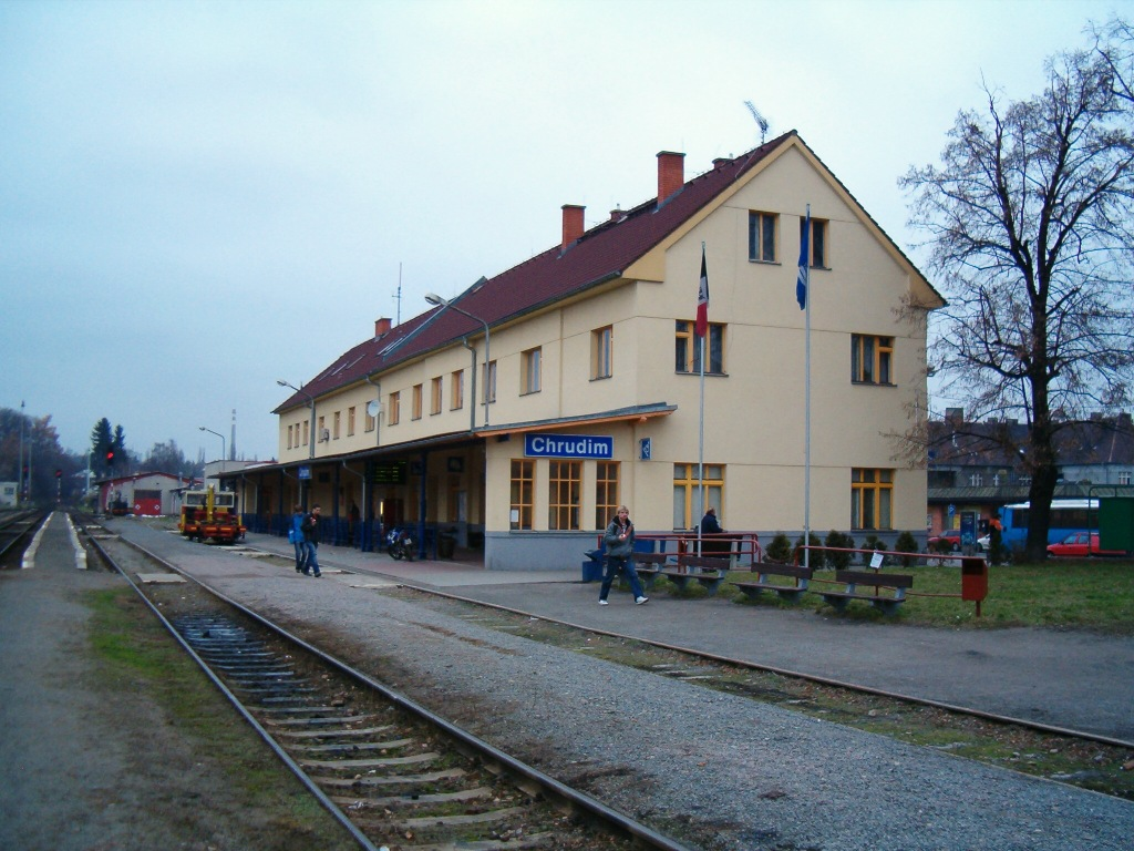 Železniční stanice ČD v Chrudimi